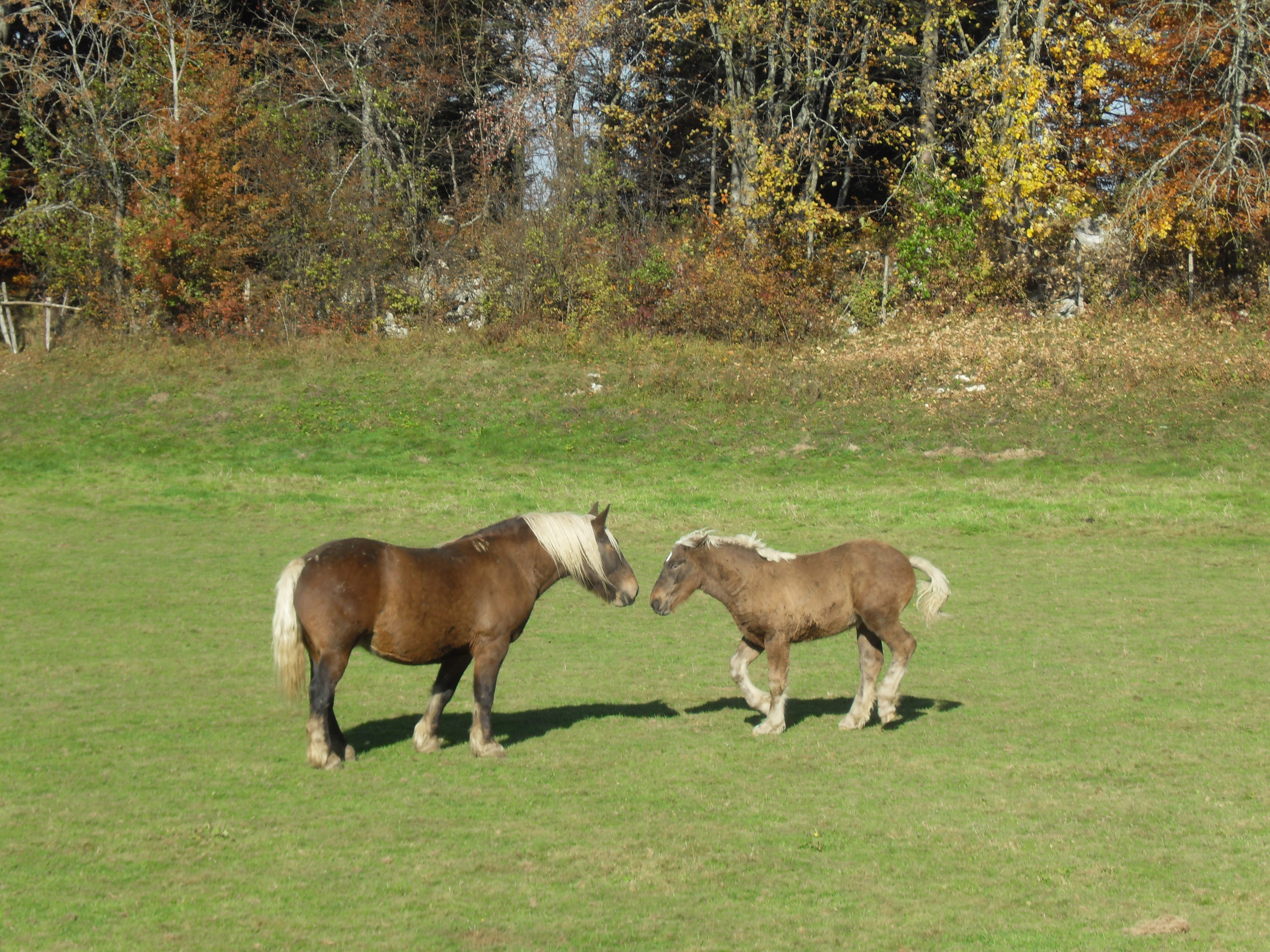 Des chevaux de races comtoise dans une prairie à Maïche, Doubs, France.